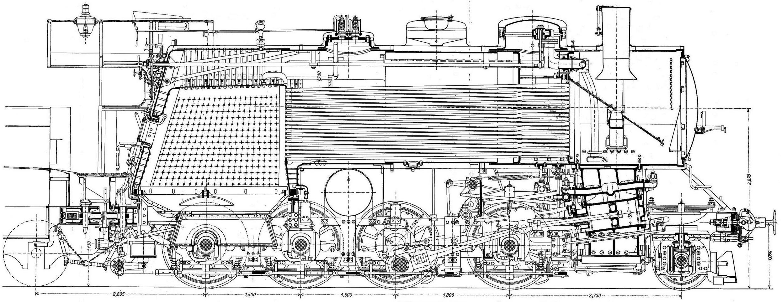 Vierzylinder-Verbund-Lokomotive der Gotthardbahn (GB) mit vier gekuppelten Achsen C 4/5 Nr. 2801–2808, gebaut 1906 von J. A. Maffei in München